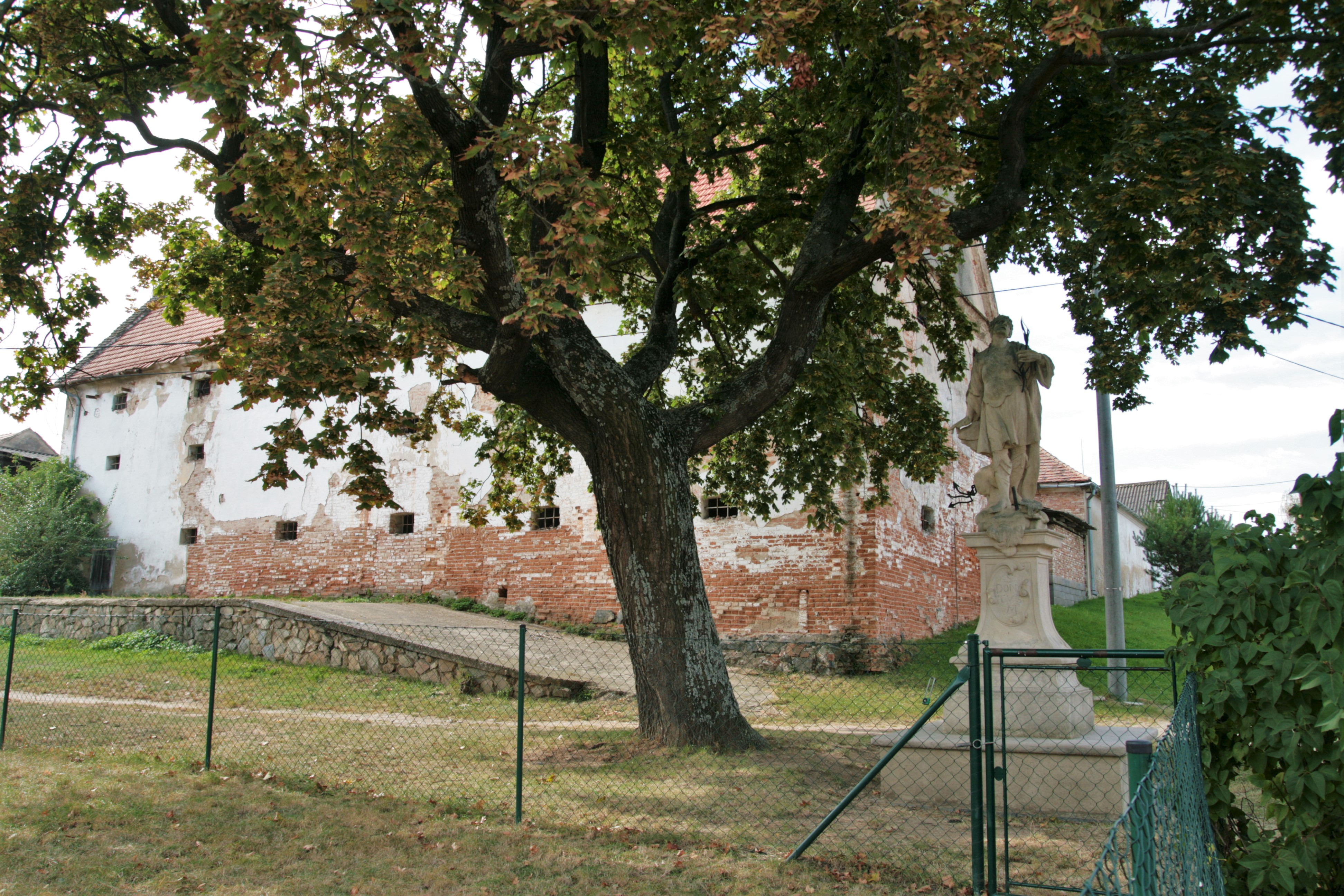 Obec Pravice v okrese Znojmo. Socha svatého Donáta u statku.